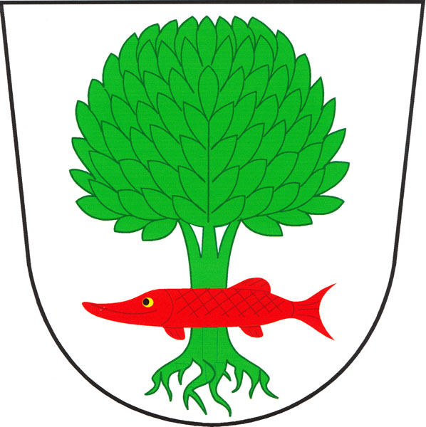 Znak obce Litostrov